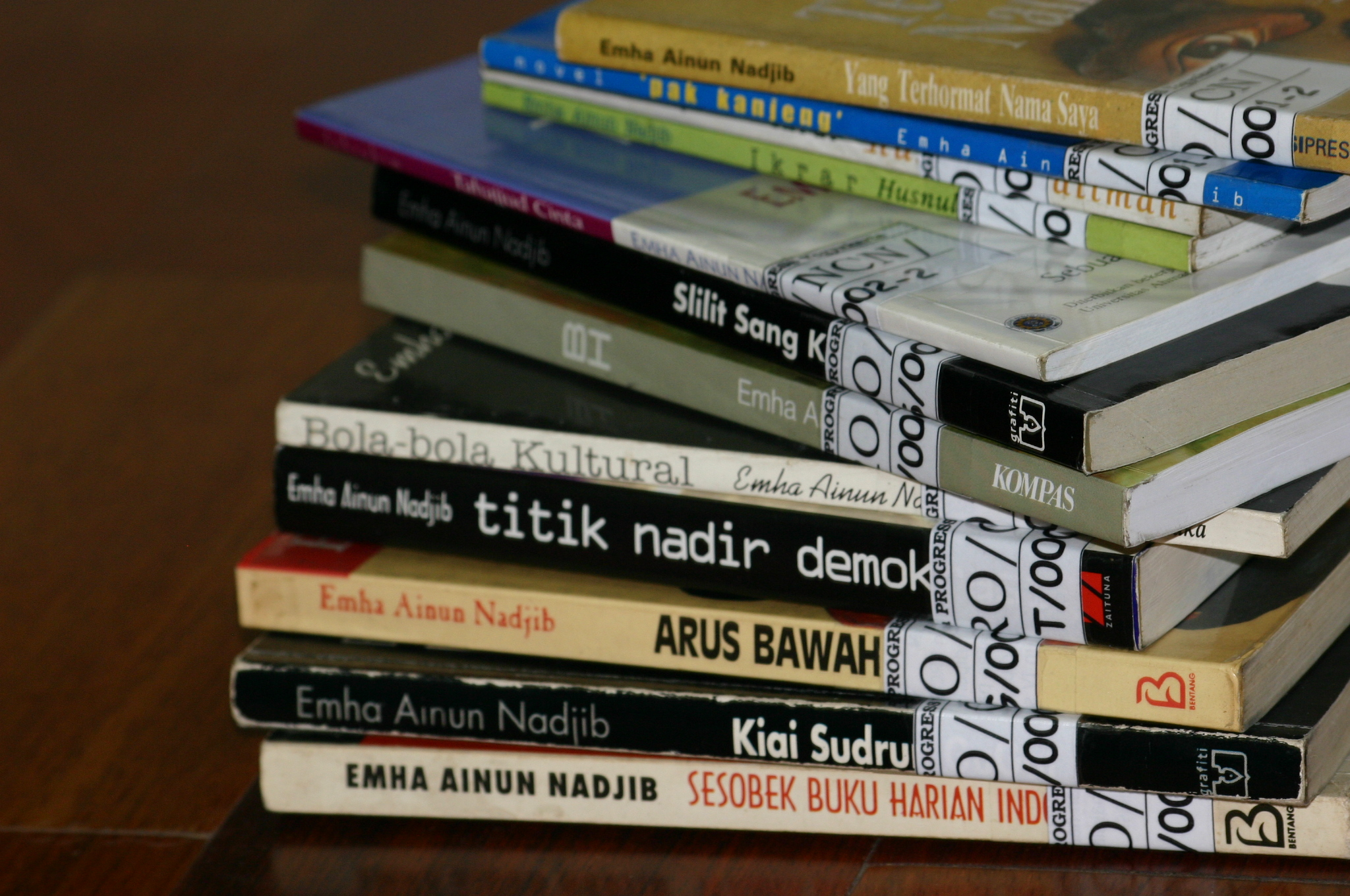 Sebagian buku-buku karya Emha Ainun Nadjib.